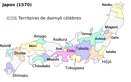 Japon : carte des domaines seigneuriaux en 1570.